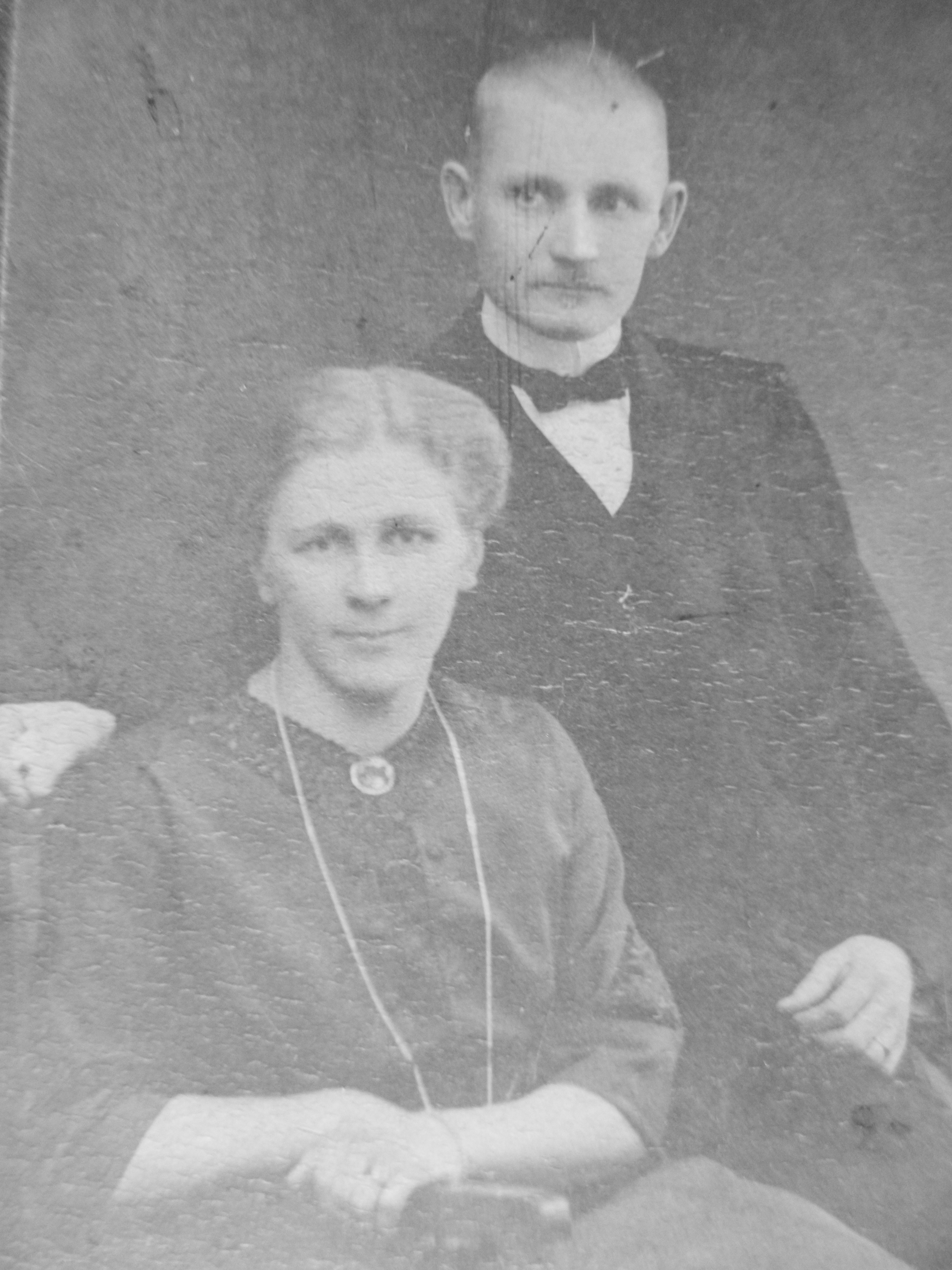 Antti ja Heleena Koposen hääkuva 25.11.1913 (kuva: H.O.K:n perhealbumi)